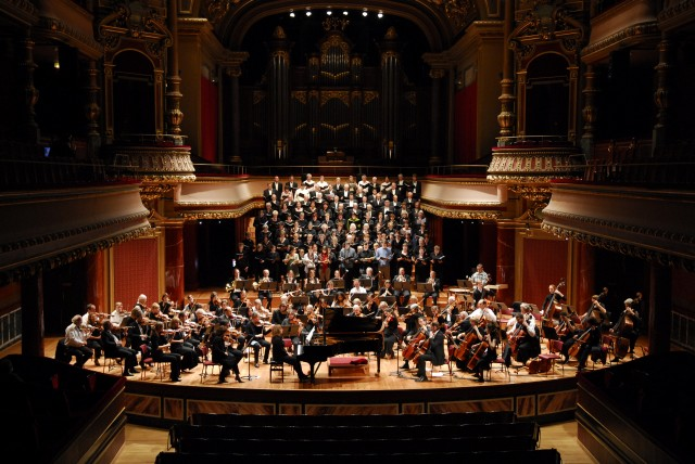 Orchestre symphonique genevois - Victoria hall, Geneve, 2007